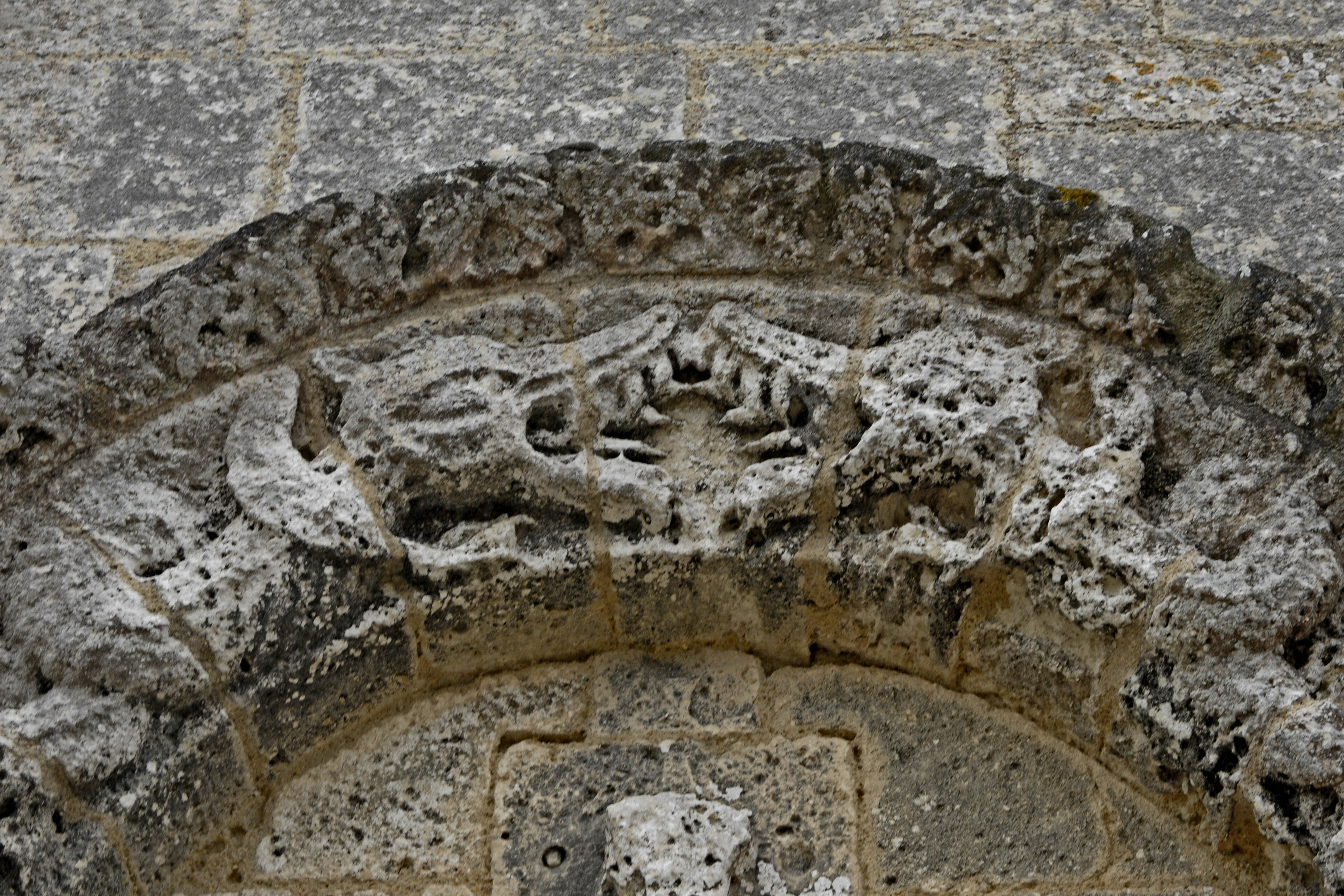 Sainte-Radegonde-Talmont-sur-Gironde, 2 Drachen gegeneinander